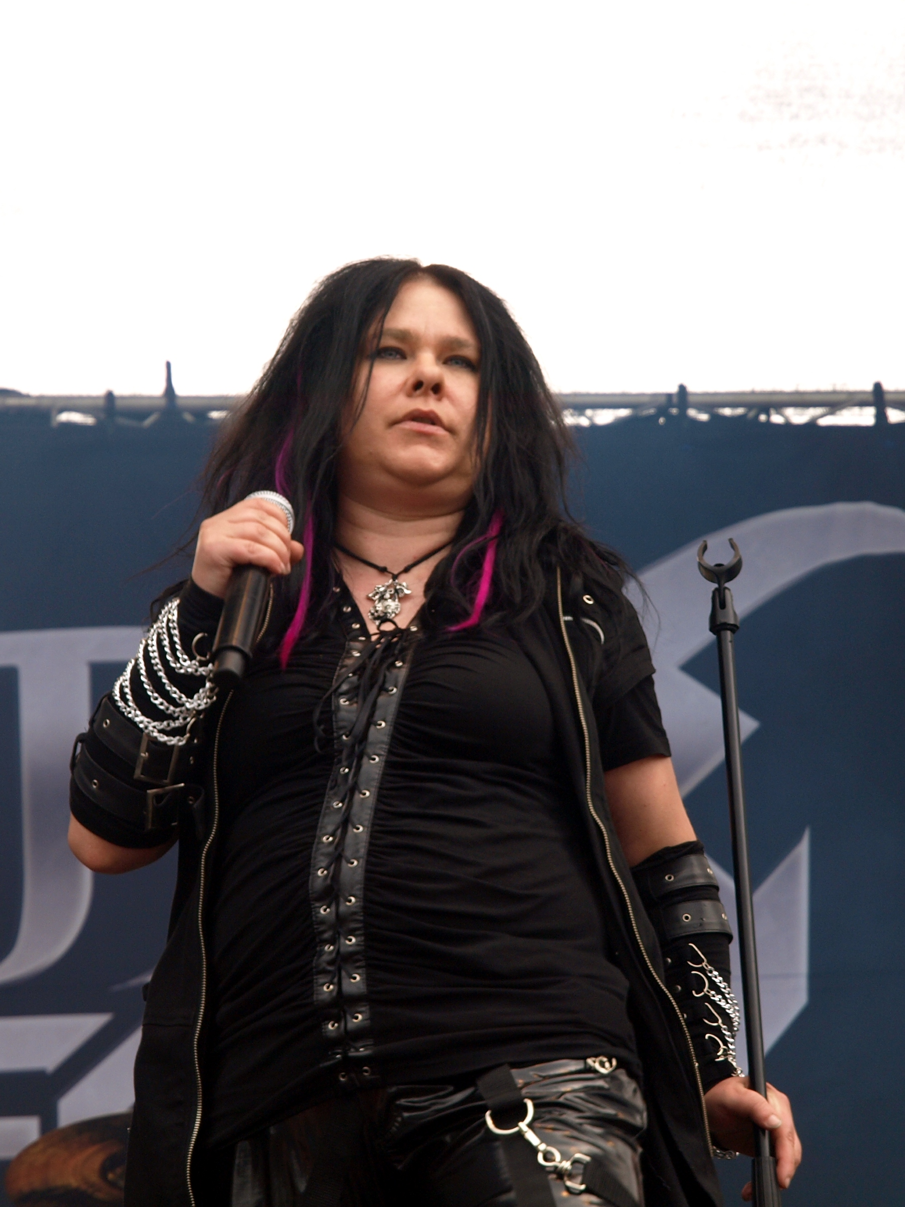 Battle Beast live am Myötätuulirock 2011